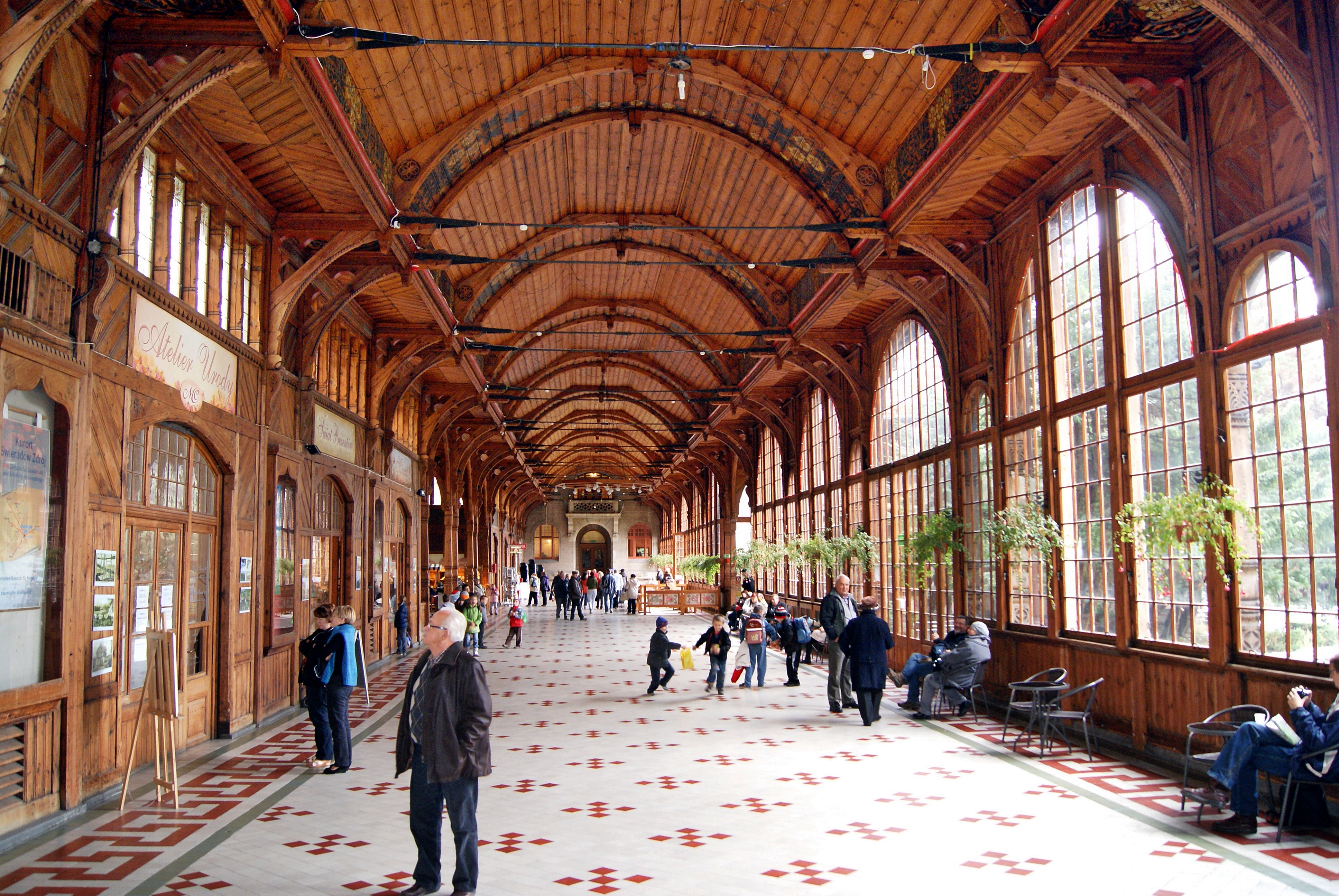 Świeradów Zdrój, Dom Zdrojowy - modrzewiowa hala spacerowa o długości 80m. (zabytek nr 351/903/J z 14.01.88)